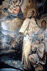 San Félix de Valois, cofundador de los trinitarios